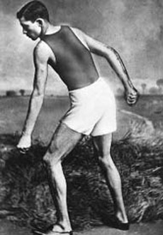 Laurence Myers, athlète américain né le 16 février 1858 et mort le 15 février 1899) , spécialiste de nombreuses disciplines (du 50 yd au mile)